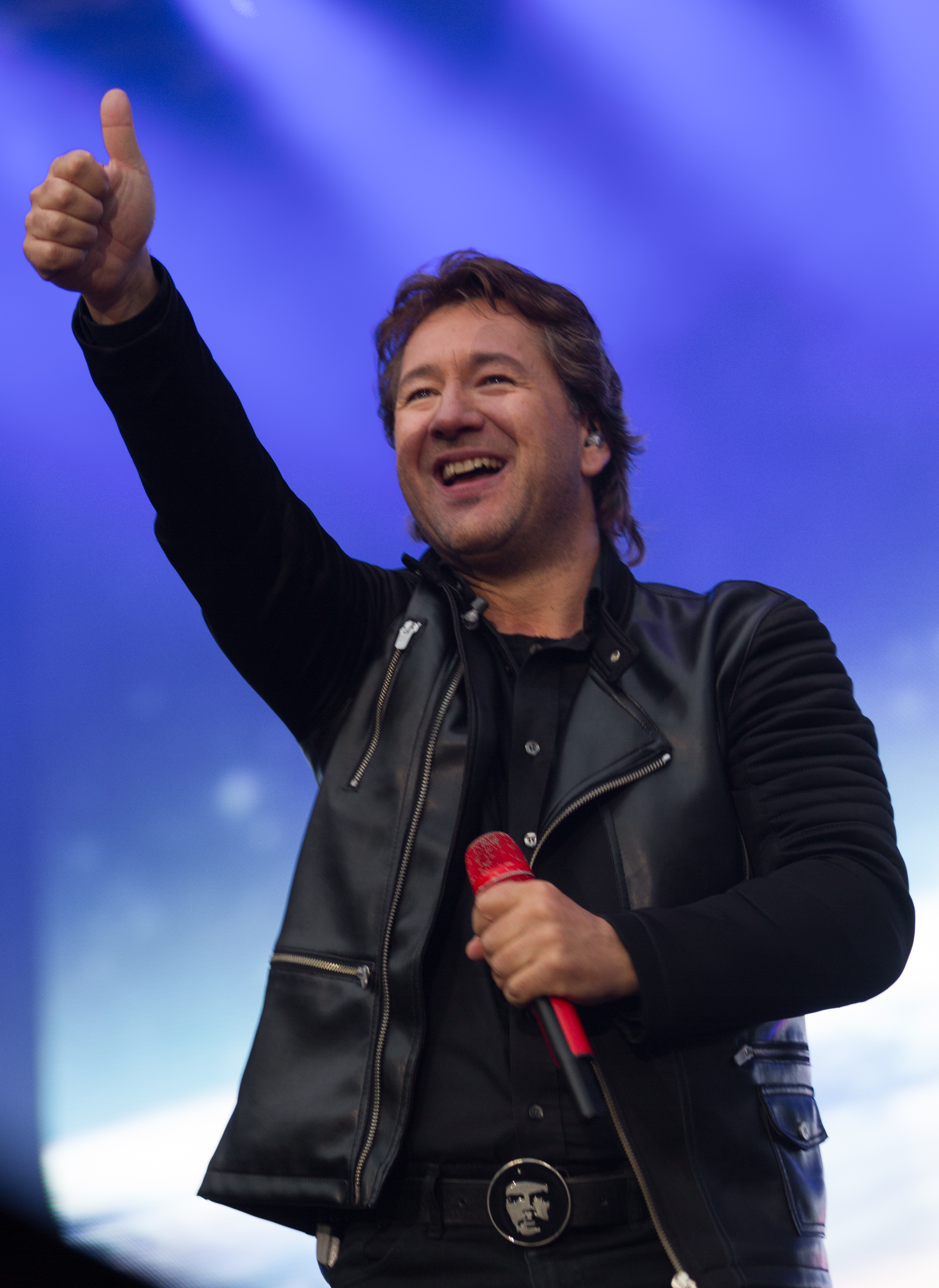 Claudius Dreilich von Karat beim "Karat 40 Jahre KARAT - Das EINZIGE Jubiläumskonzert" in der Berliner Waldbühne am 20.06.2015